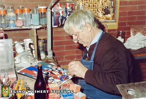 Egino Weinert in seiner Werkstatt in Köln. Mit der verbliebenen linken Hand emailliert er seine Bilder.